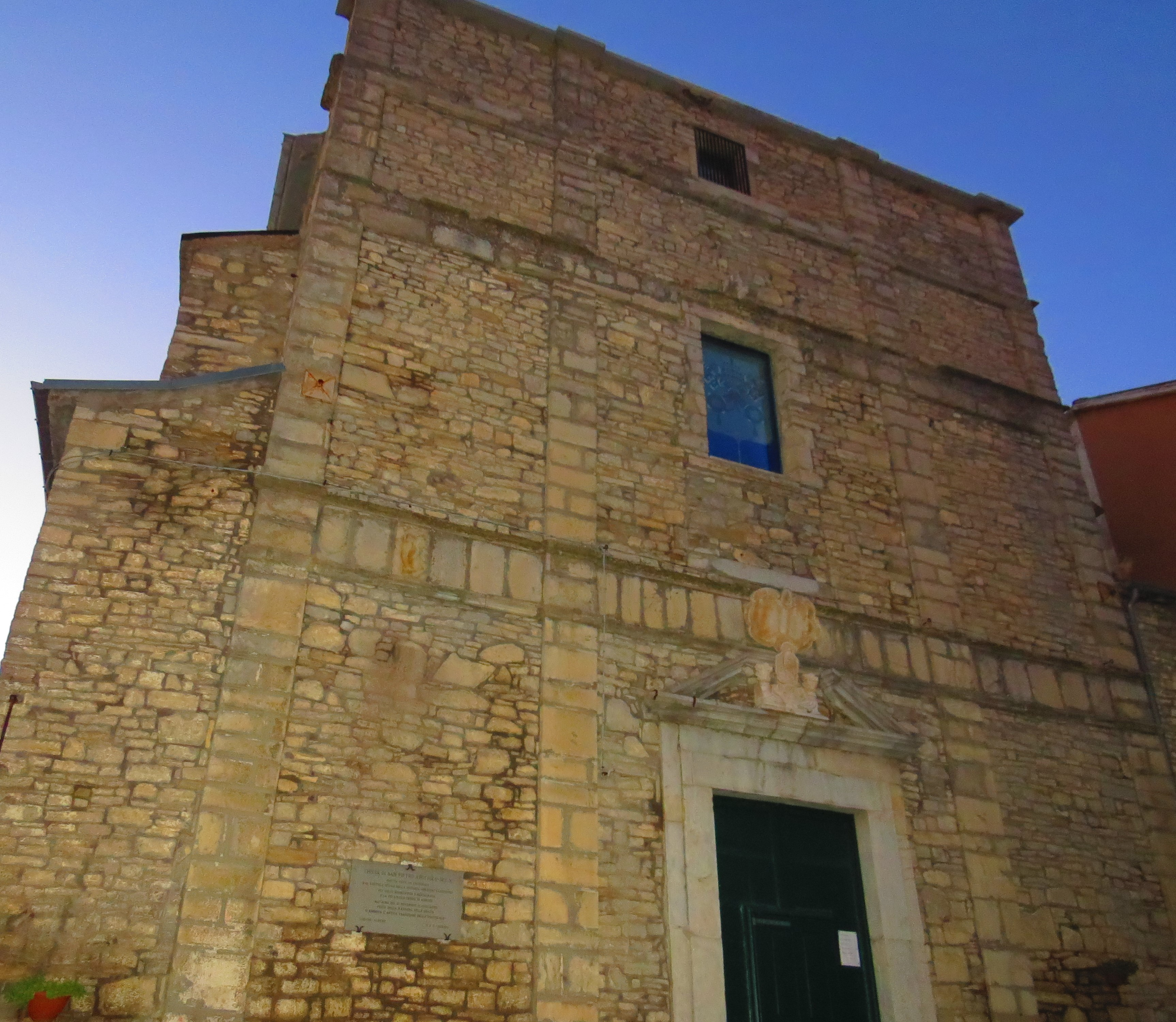 Agnone